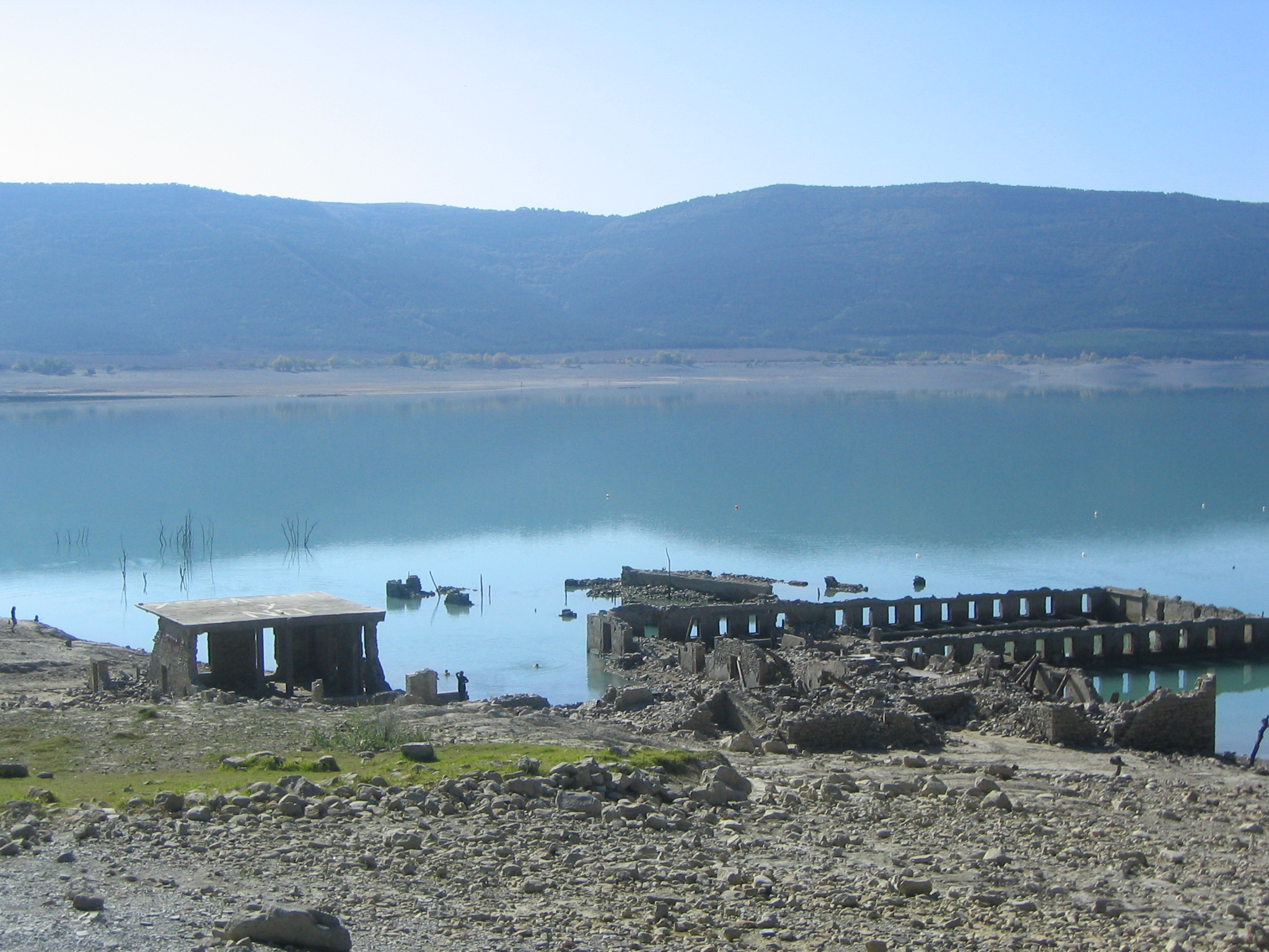 Restos del balneario de Tiermas, Zaragoza España. Hoy día se sigue utilizando el manantial cuando el embalse de Yesa esta bajo.